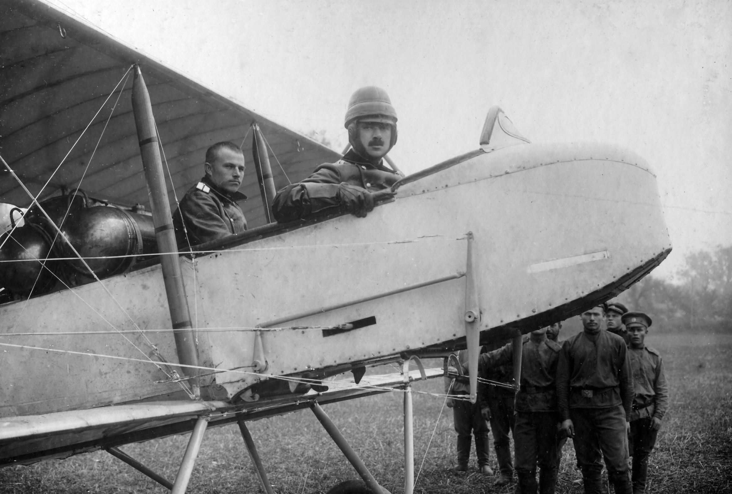 Вишняков В Ф в Farman 2